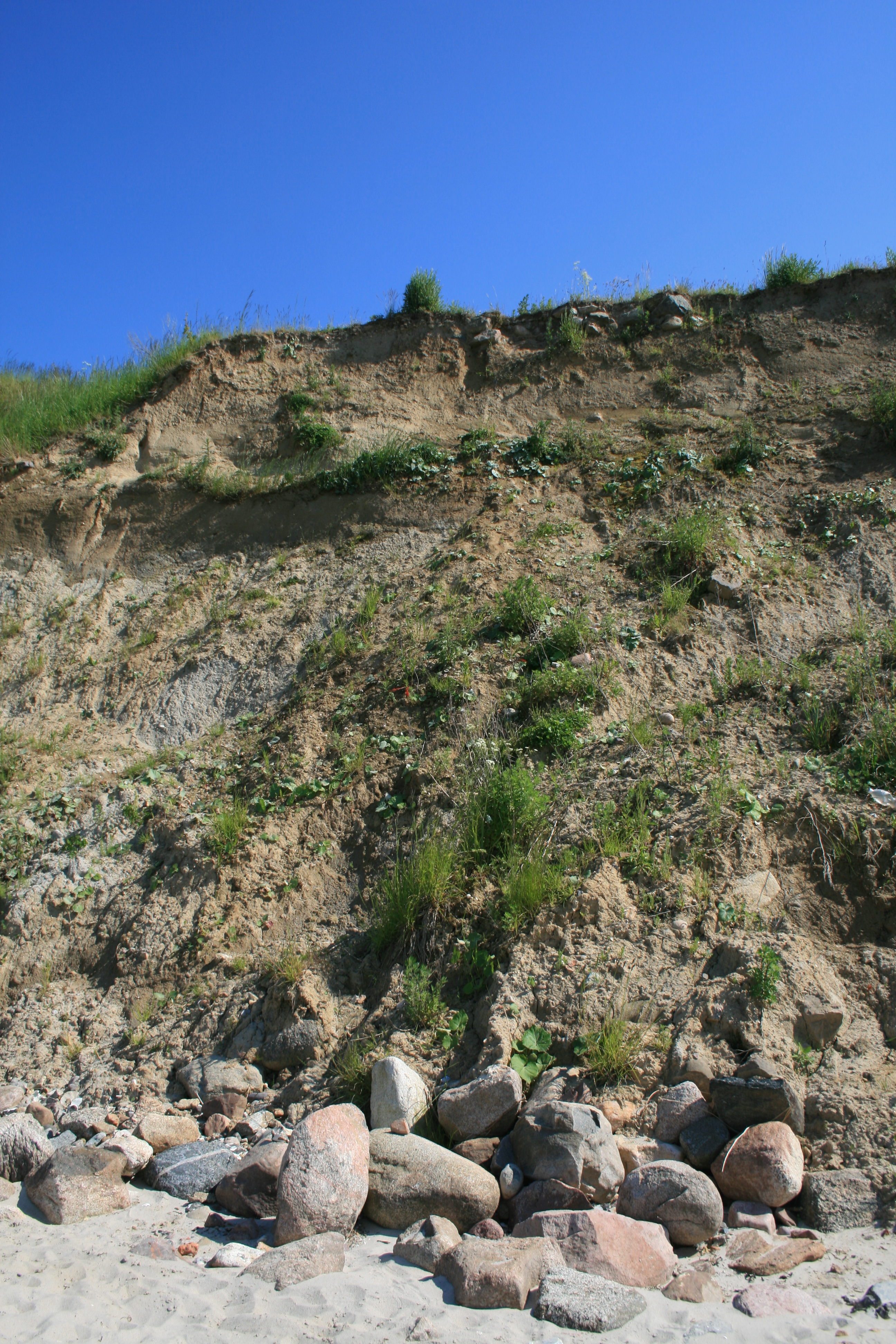 Steinküste bei Jellenbek / Küstenlandschaft Dänischer Wohld (58-RD-50); erkennbar sind die Fundamentsteine der aufgegebenen Katharinen-Kirche von Jellenbek